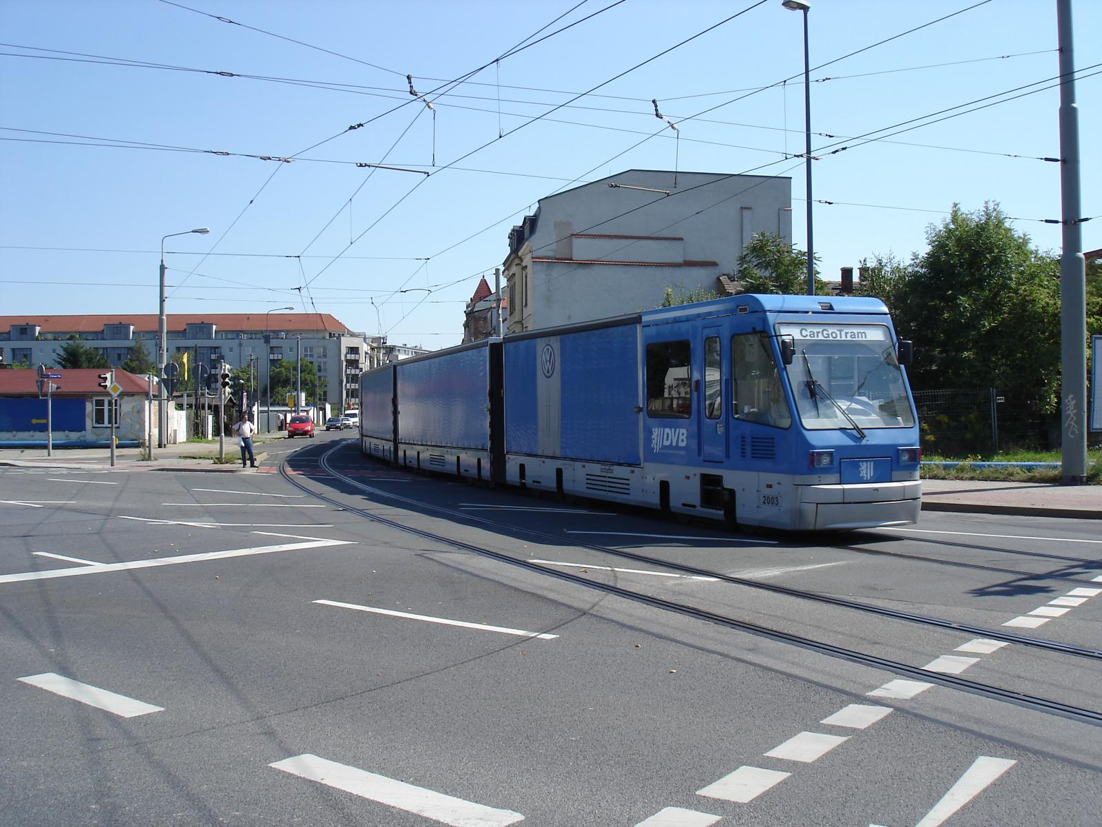 CarGoTram 2003 verlässt beladen den Bahnhof Dresden Friedrichstadt